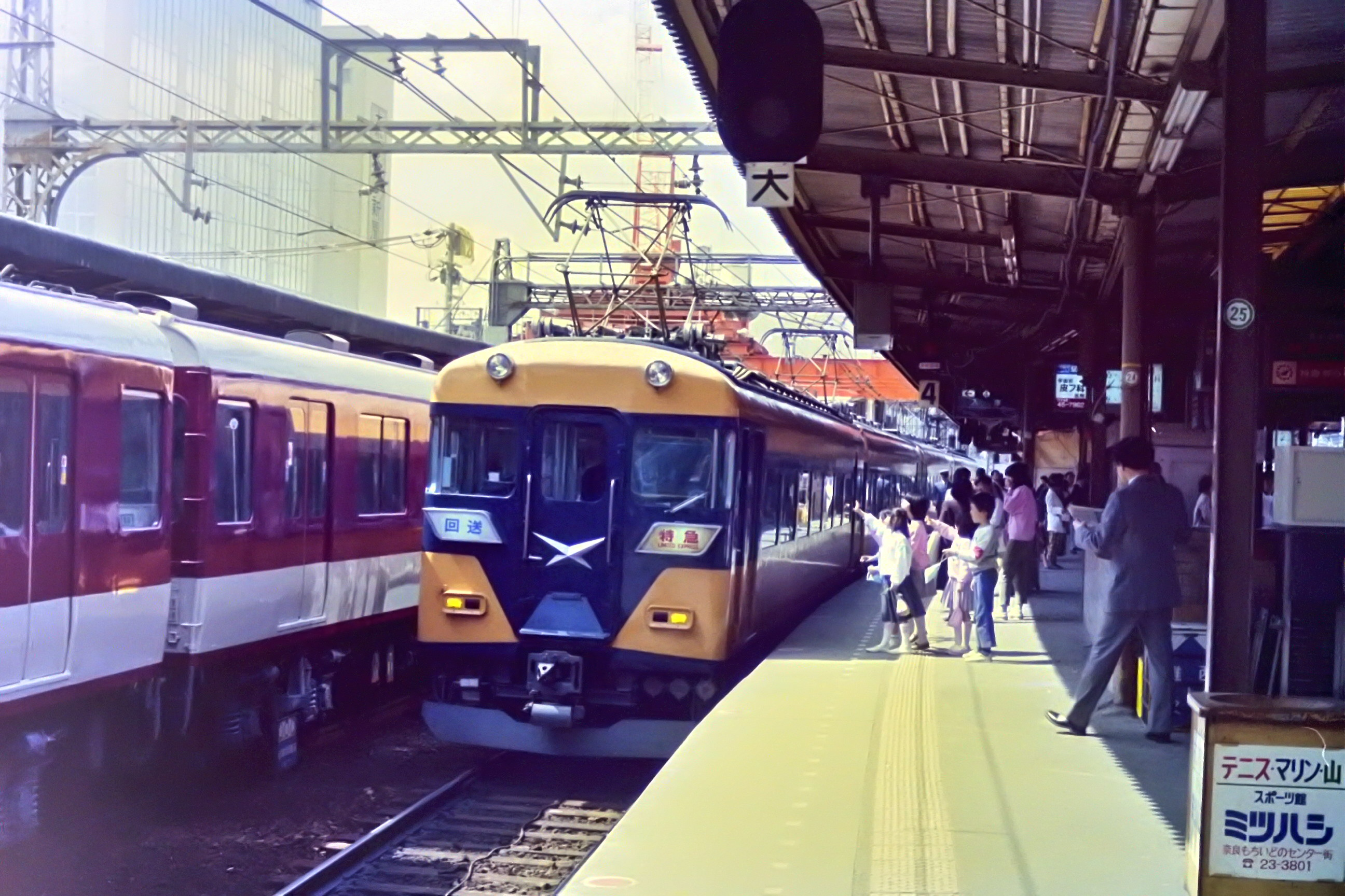 近鉄18200系 1986年9月 大和西大寺駅